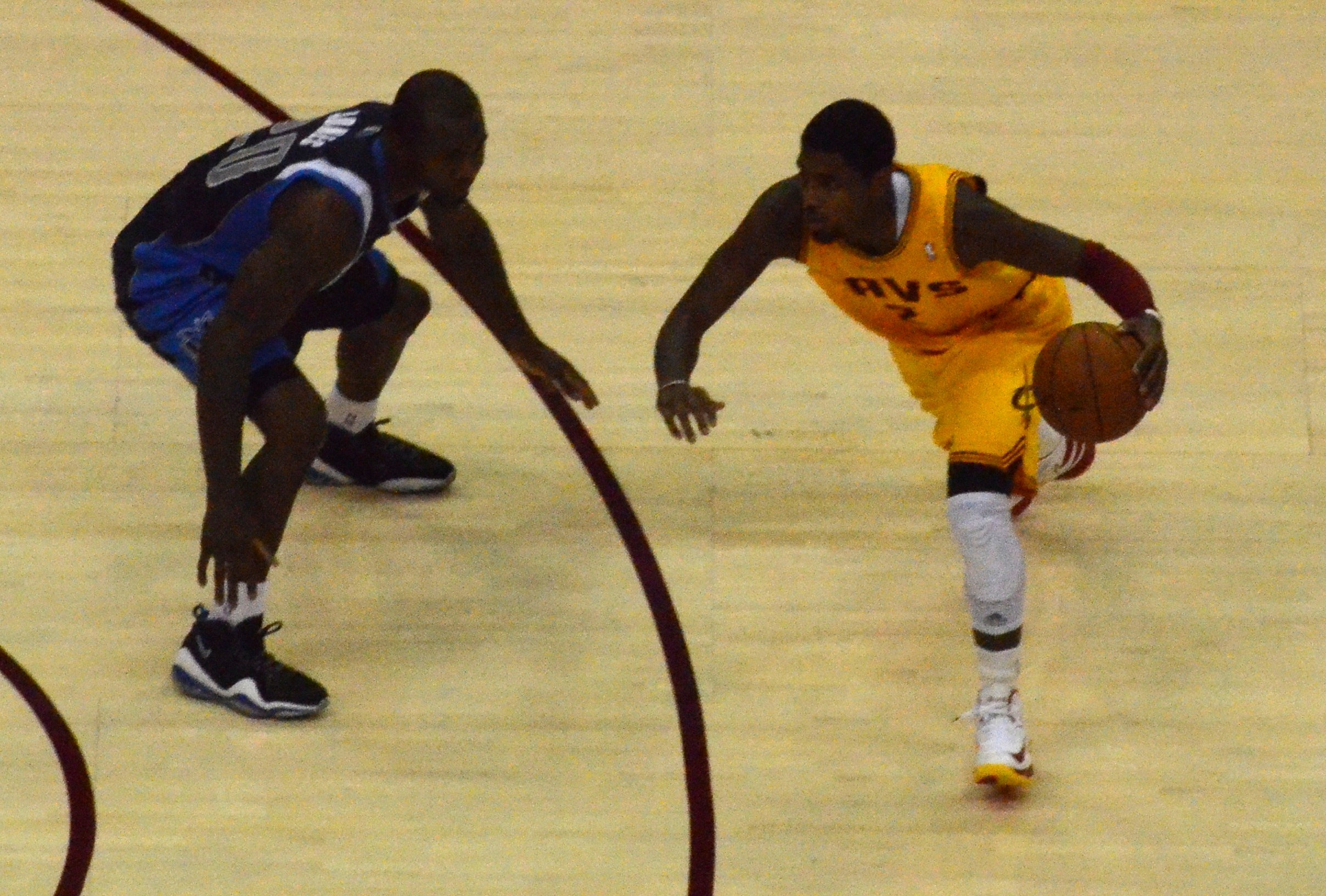 Kyrie Irving